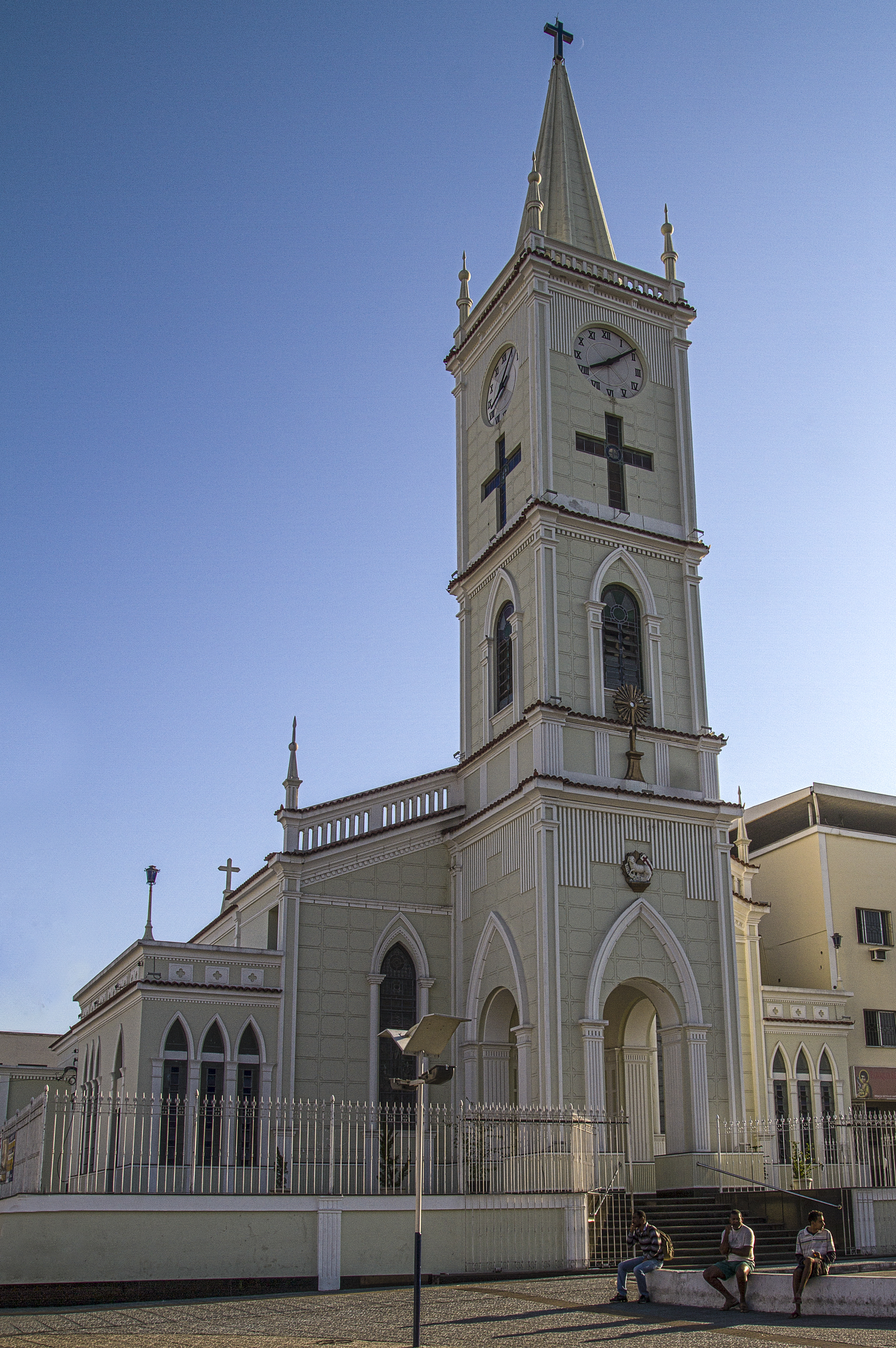 Praça da Matriz, também conhecida como Praça Getúlio Vargas é um dos pontos turísticos de São João de Meriti